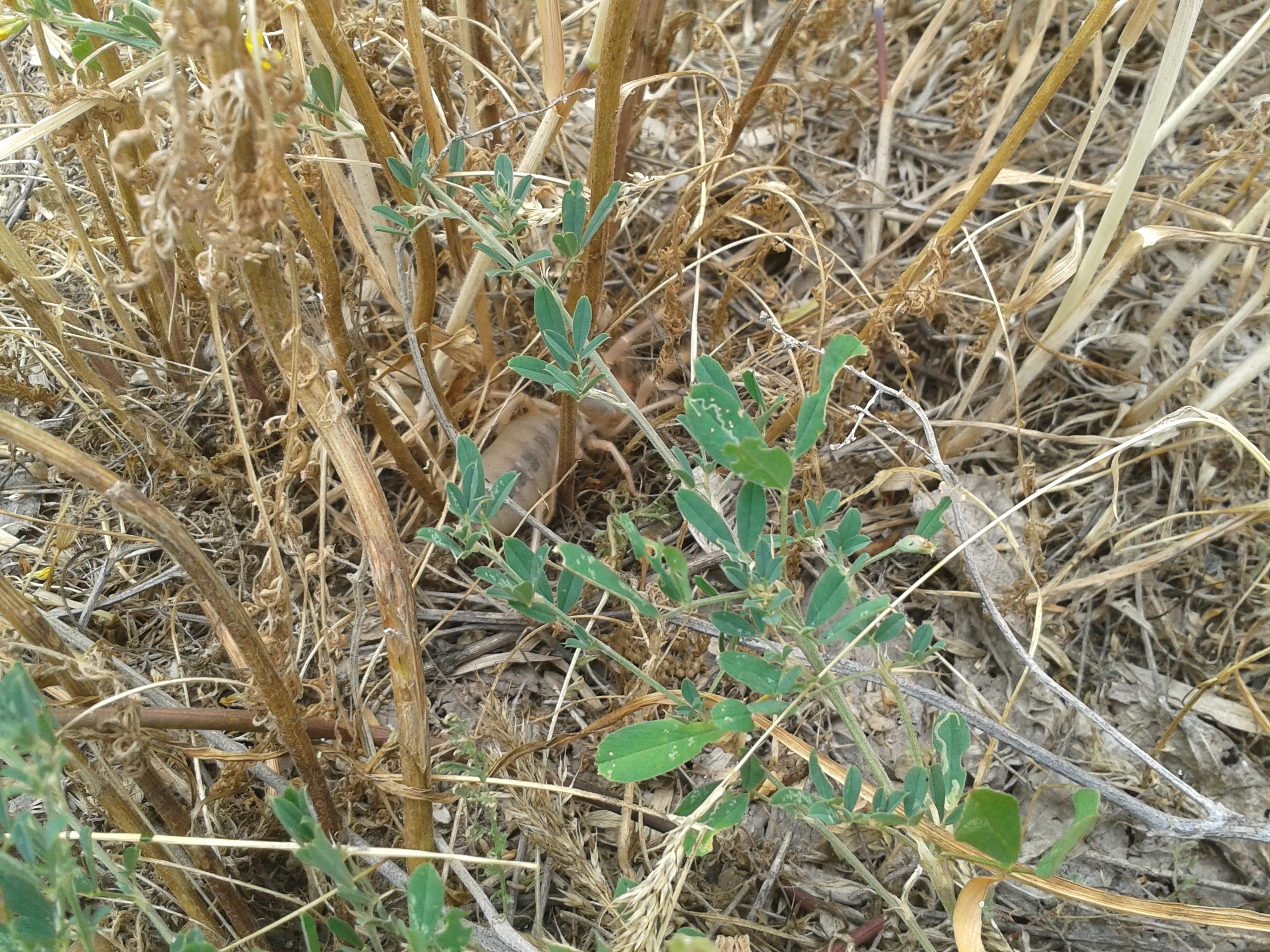 Сольпуга обыкновенная, 5 июля 2014 года